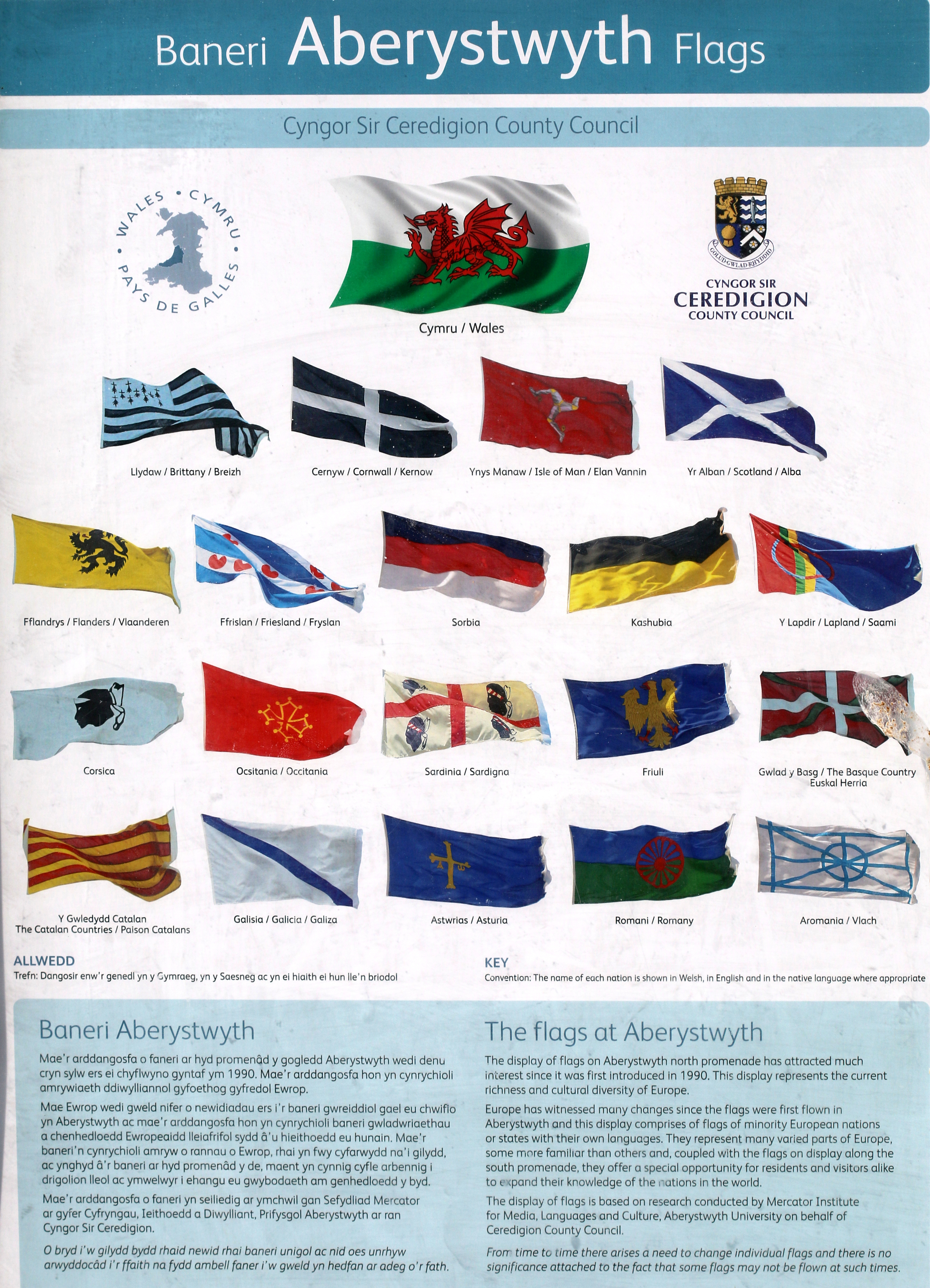 Aberystwyth, Ceredigion, Wales